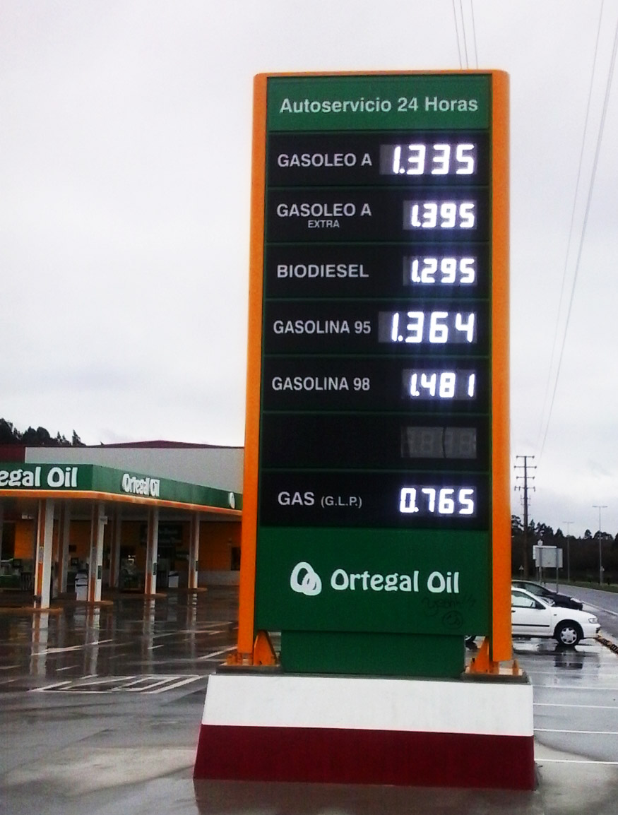 Estación de servizo de Ortegal Oil en Río do Pozo Narón A Coruña